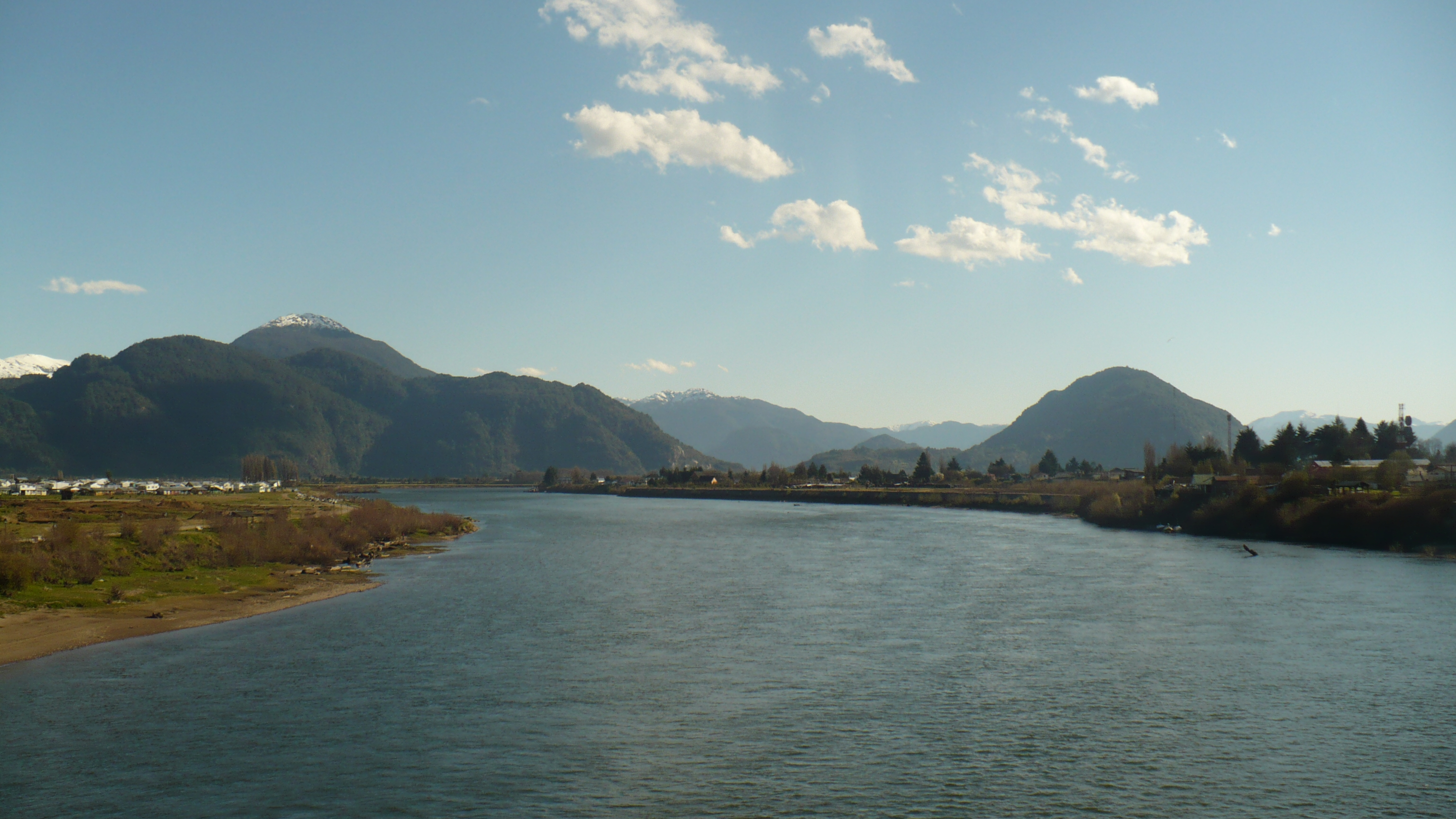 Desde el Puente Presidente Ibánez